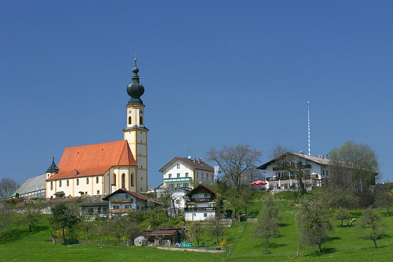 Hoeslwang